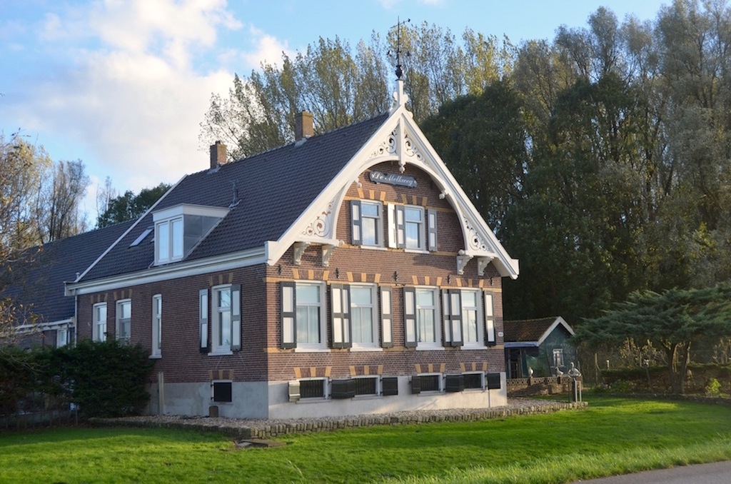 Boerderij de Melkweg, Lutkemeerweg 149, Oud Osdorp. Foto: Erik Swierstra.